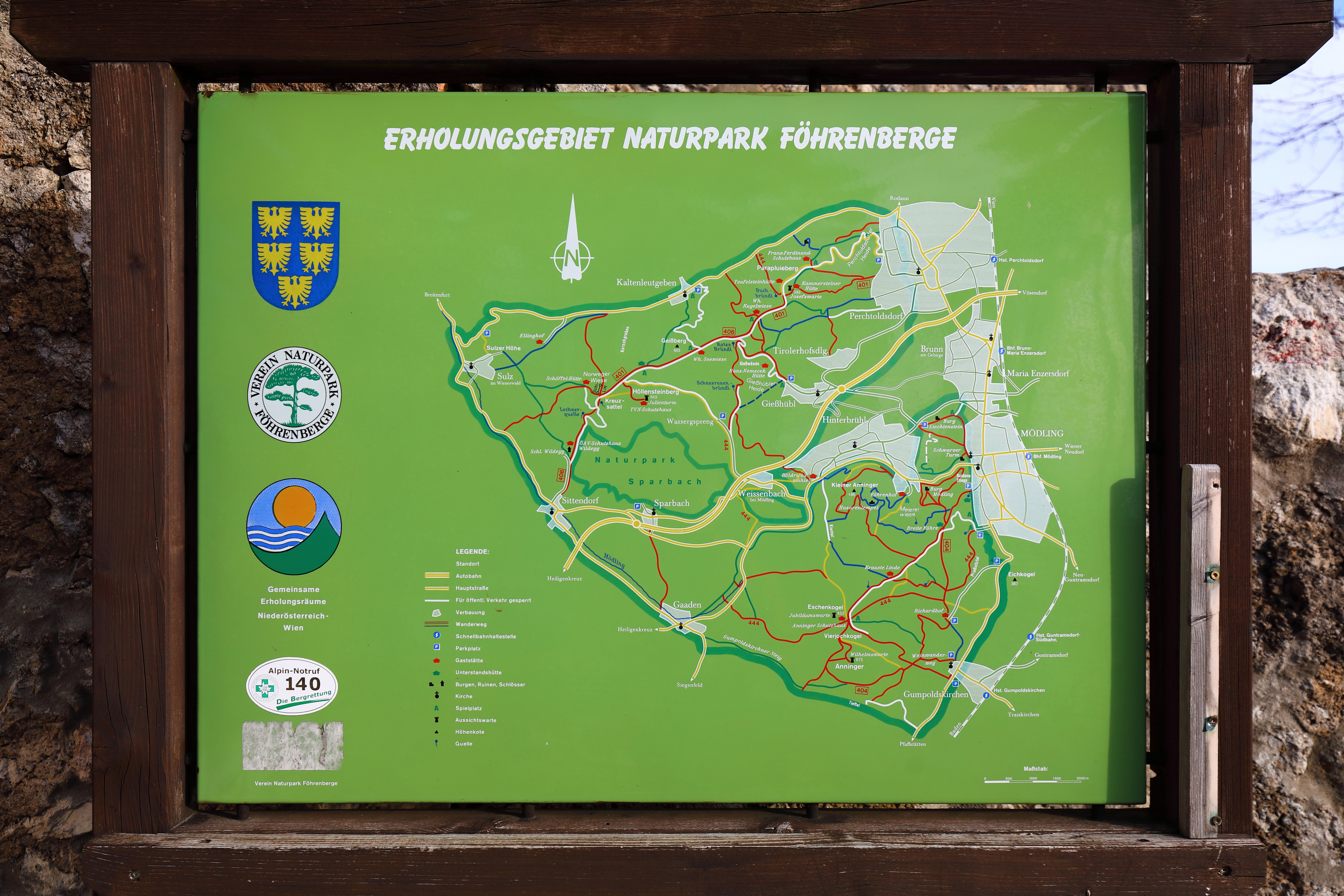 Infotafel über das Erholungsgebiet Naturpark Föhrenberge am Gipfel des 645 m hohen Höllenstein(berg) in der niederösterreichischen Marktgemeinde Kaltenleutgeben. Die Tafel ist öffentlich zugänglich und befindet sich westseitig am 1880 errichteten Julienturm, an dem wiederum das Hölleinsteinhaus angebaut ist.